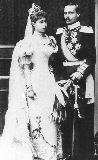 Ernesto de Hesse com a primeira mulher, a Princesa Vitória Melita no dia de casamento.